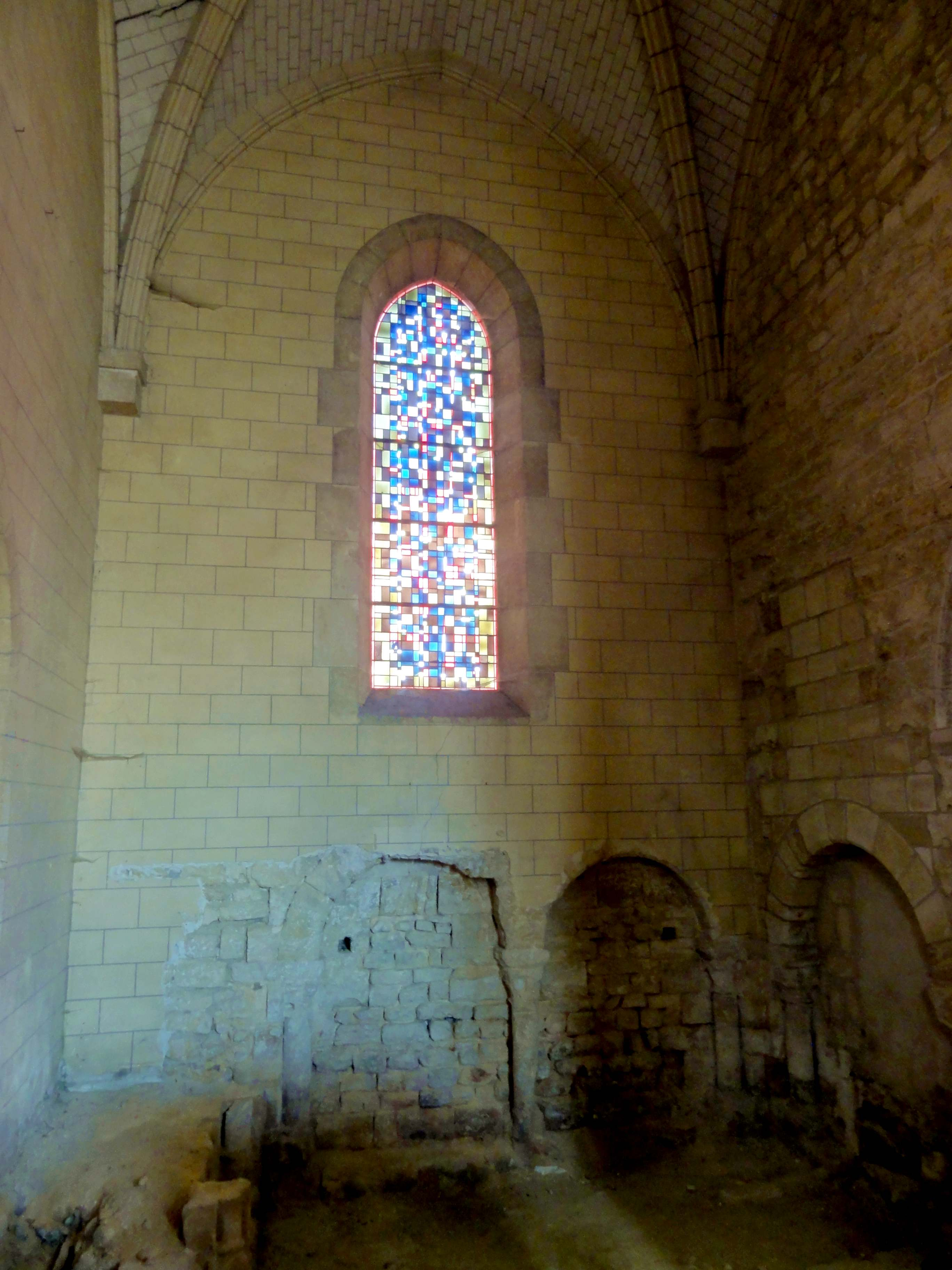 Intérieur de l'église - voir titre.